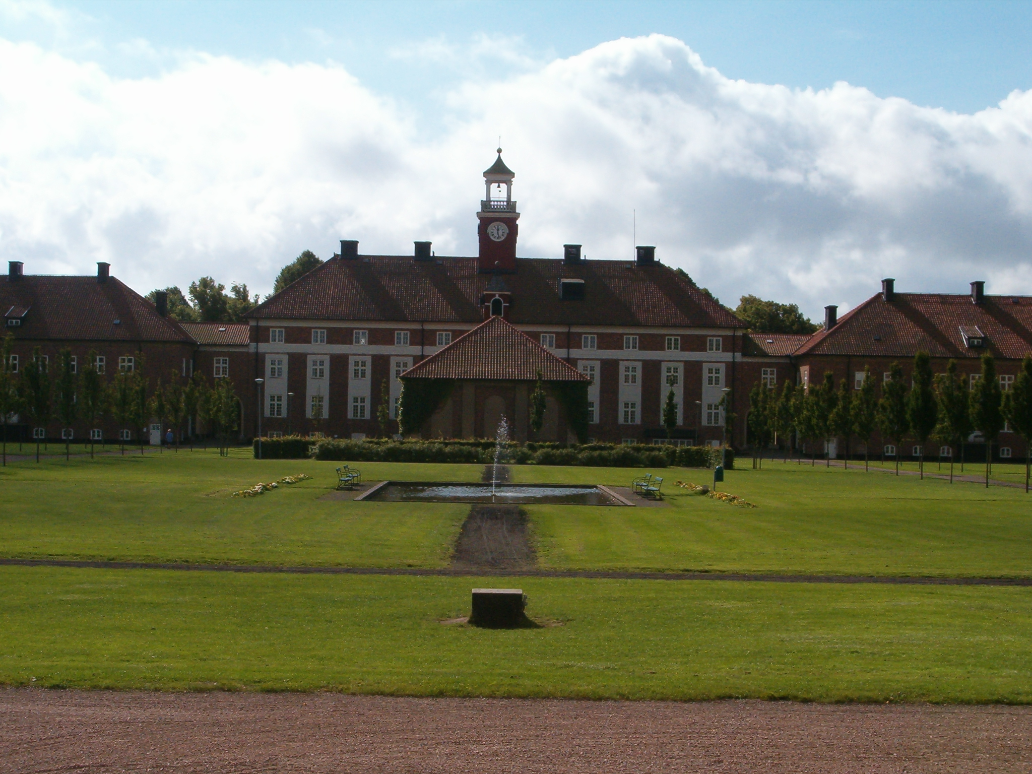 Sankta Maria, former mental hospital in Helsingborg, Sweden.